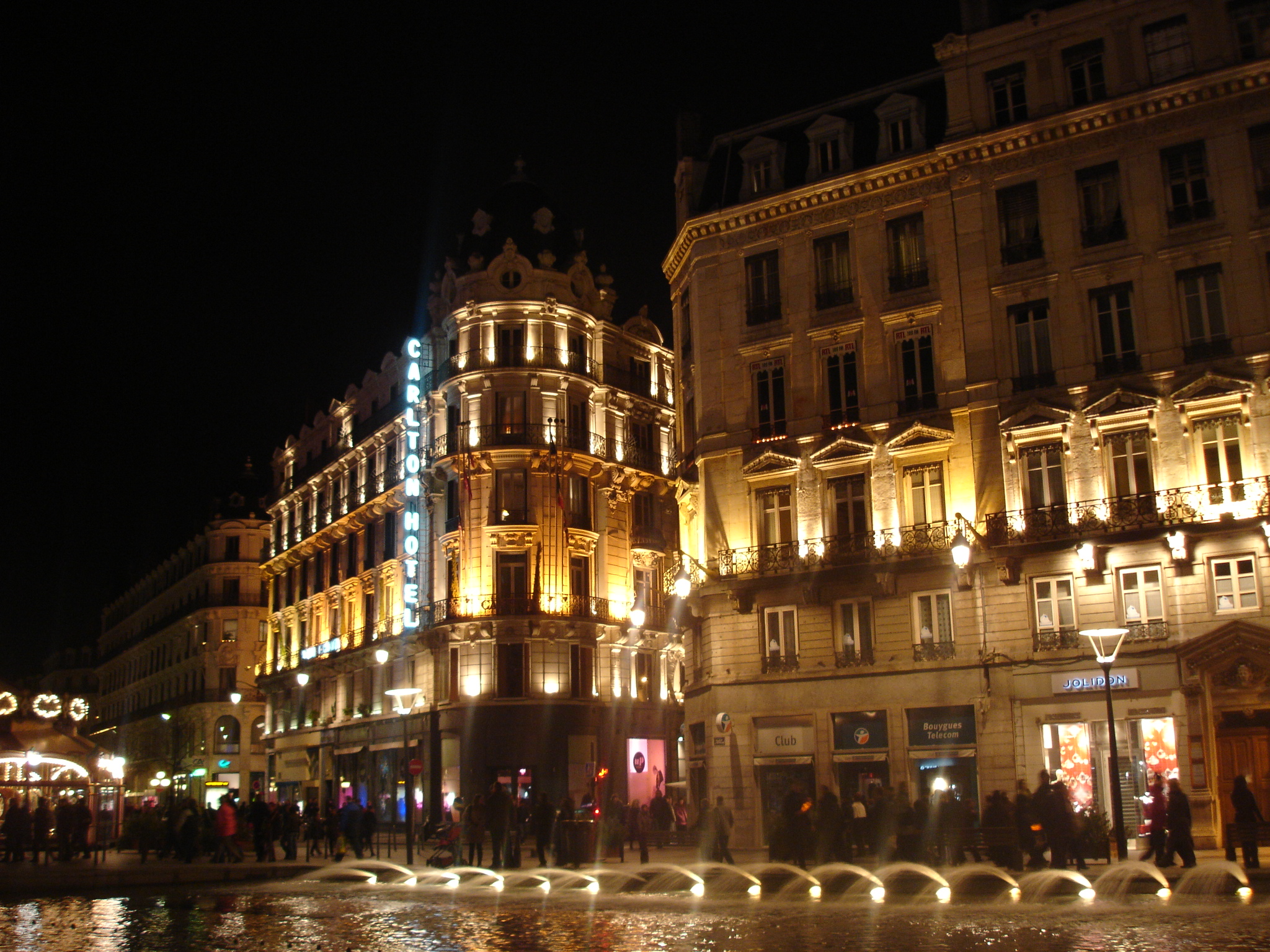 Lyon : Place de la république le 8 décembre 2009